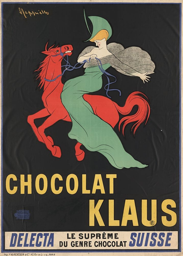 Leonetto Cappiello (1875-1942): Chocolat Klaus